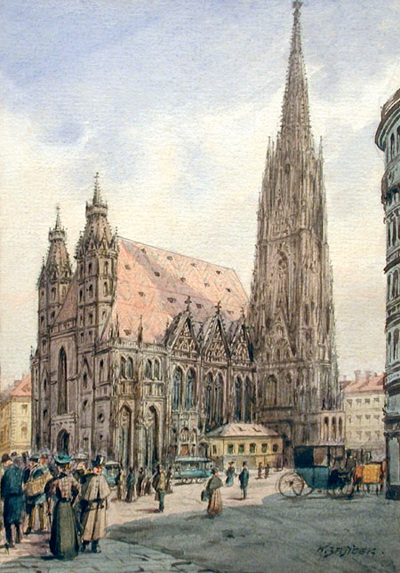 Der Stephansdom